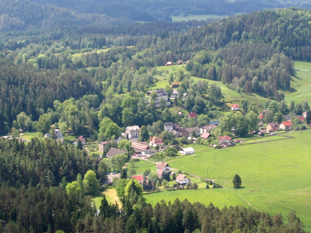 Pohled na Jetřichovice z Mariánské vyhlídky. Licence: Self_GFDL_and_cc-by-sa-2.5